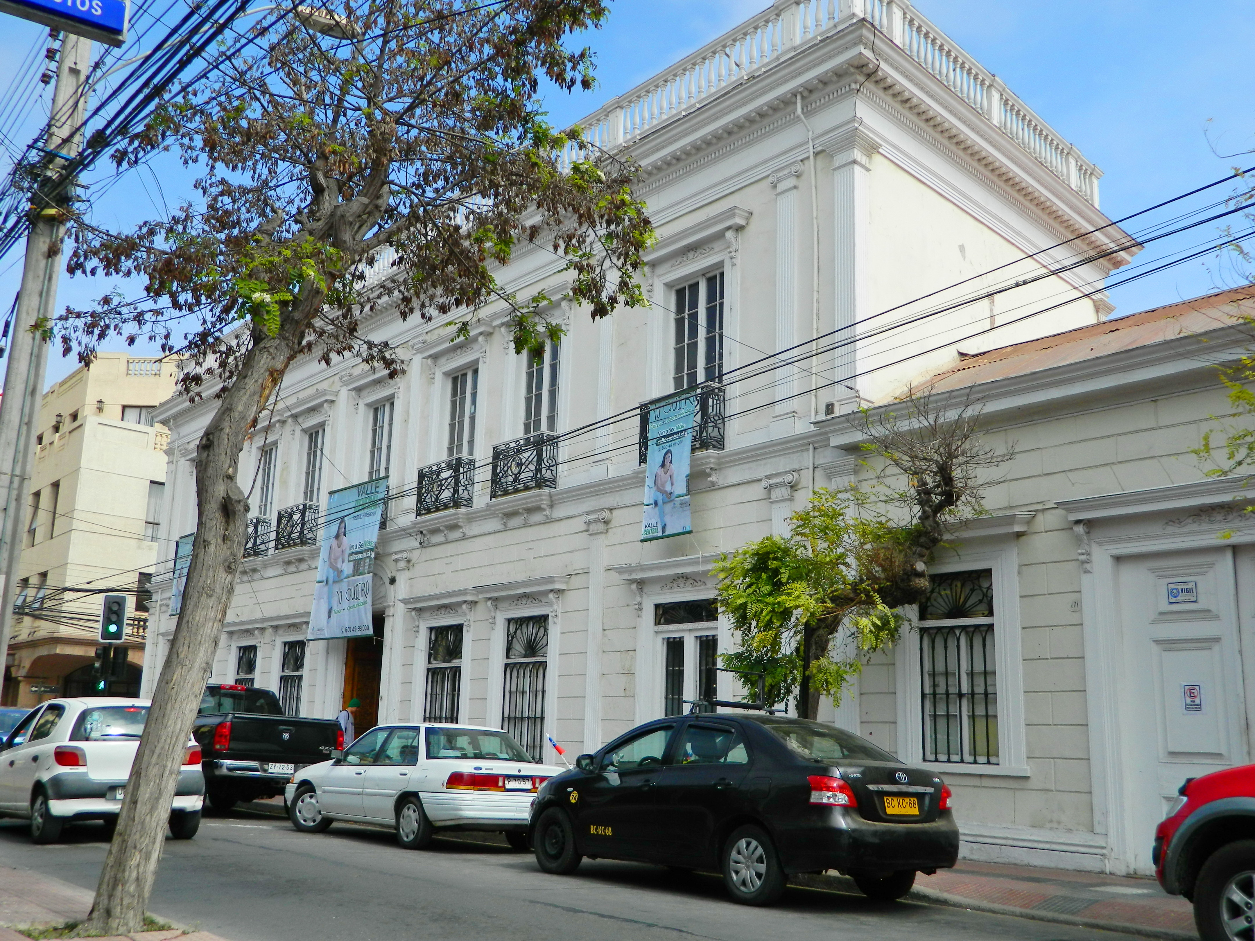 Casa Chadwick This is a photo of a national monument in Chile: 348